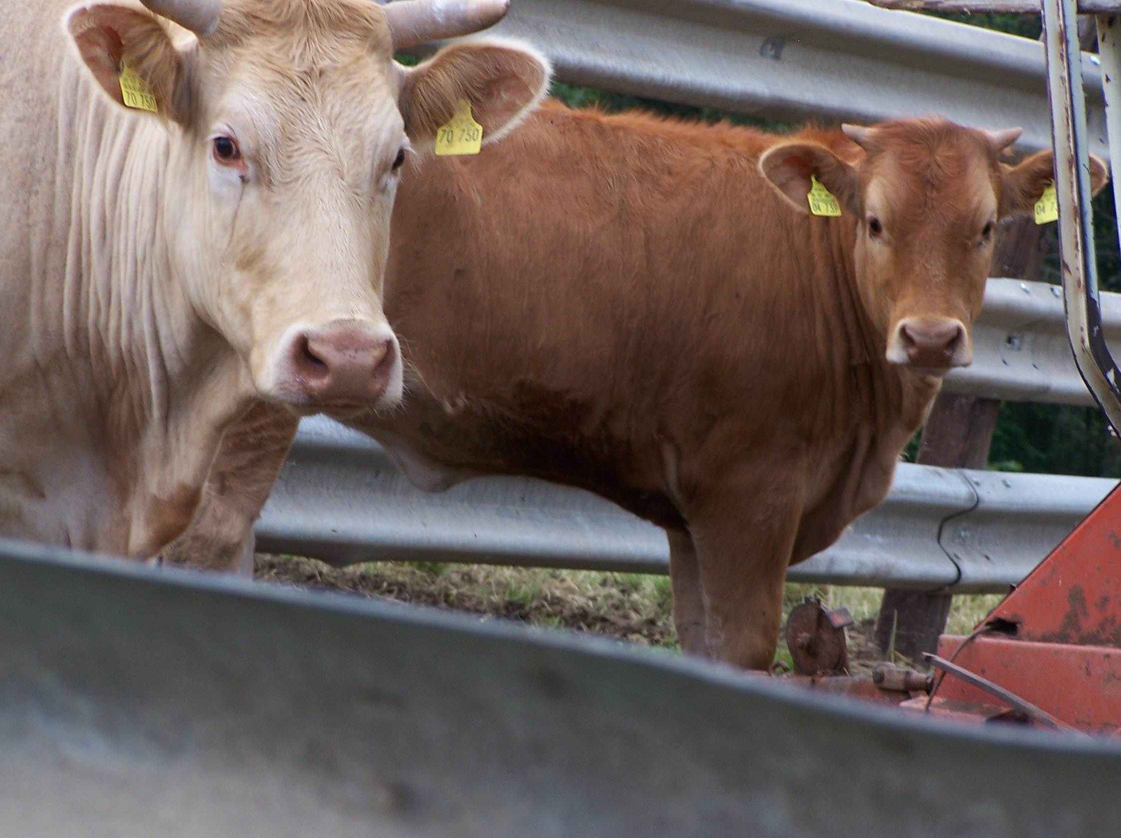 A Glan Cattle cow. Photographed in Raumbach (near Meisenheim, Rheinland-Pfalz)